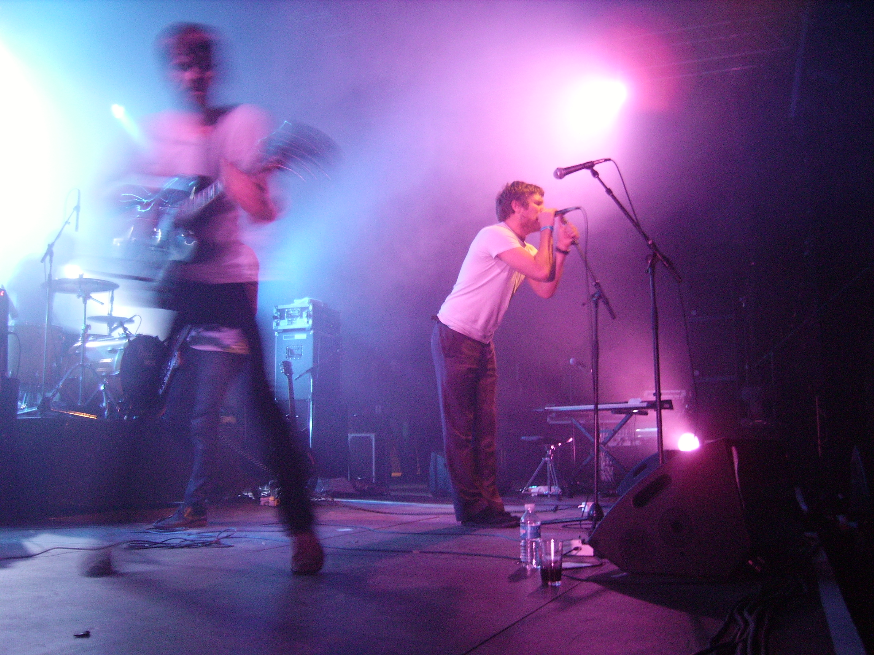 Photo du groupe de rock, Cold War Kids, aux transmusicales 2006 de Rennes